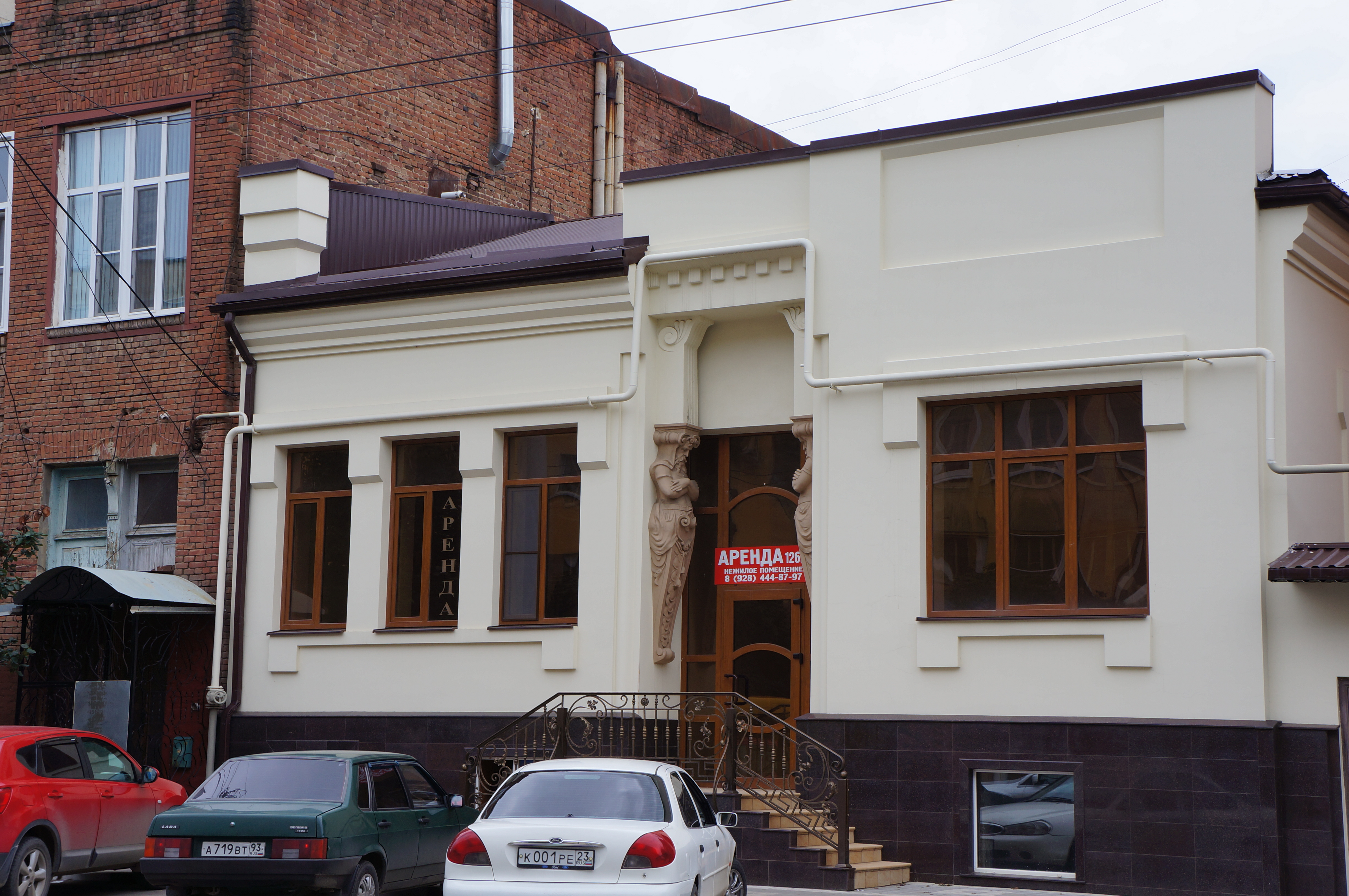 Жилой дом с двумя атлантами (Краснодарский край, Армавир, улица Свердлова, 64)